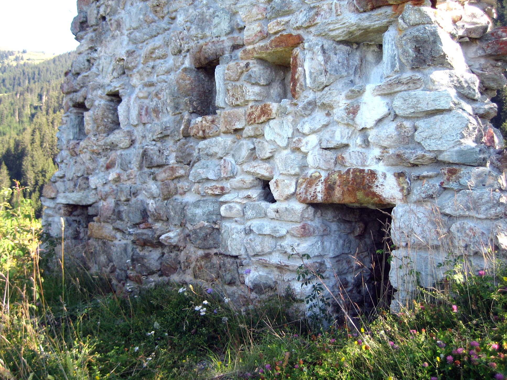 Mauerbasis Süden